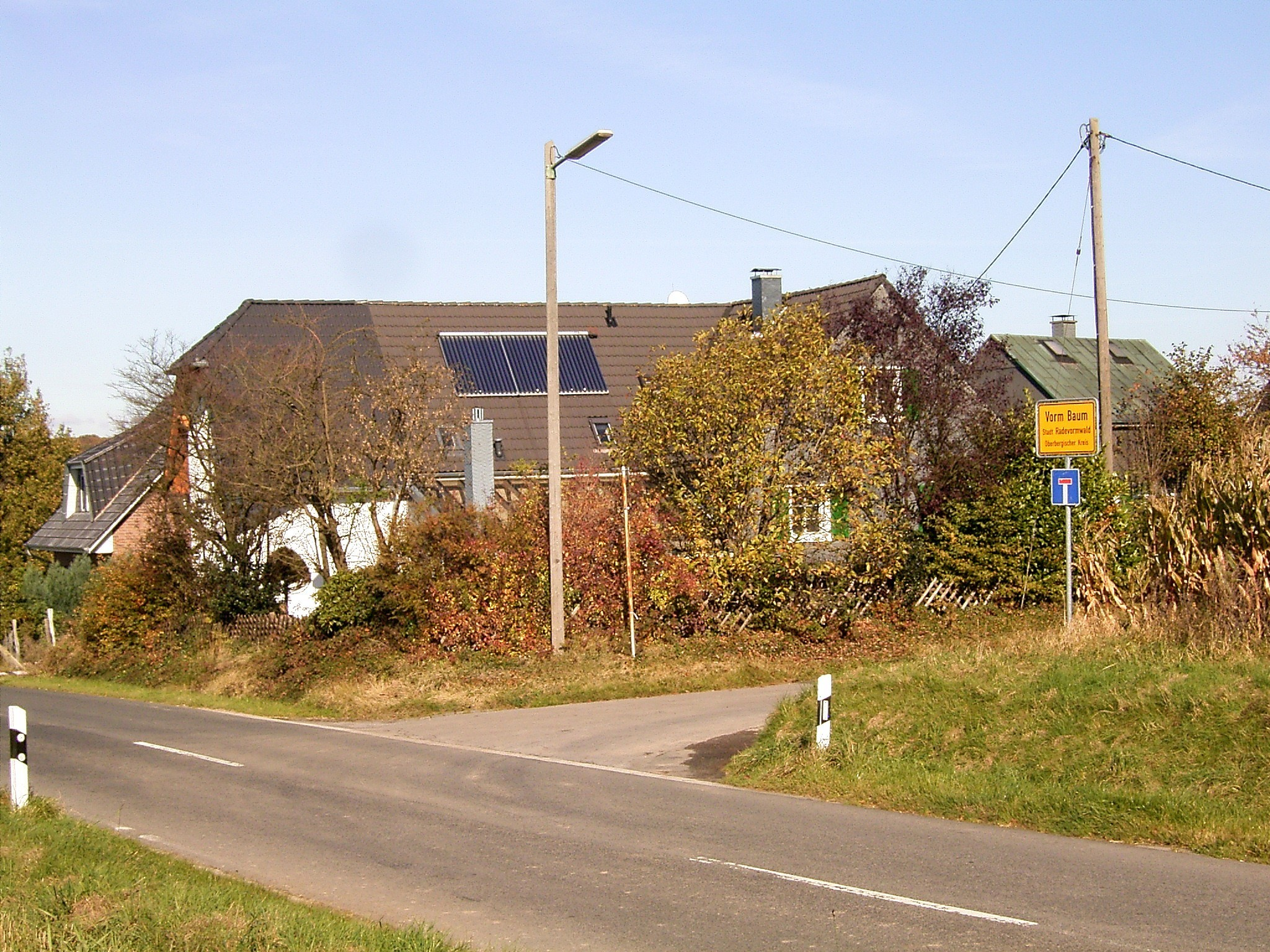 Radevormwald